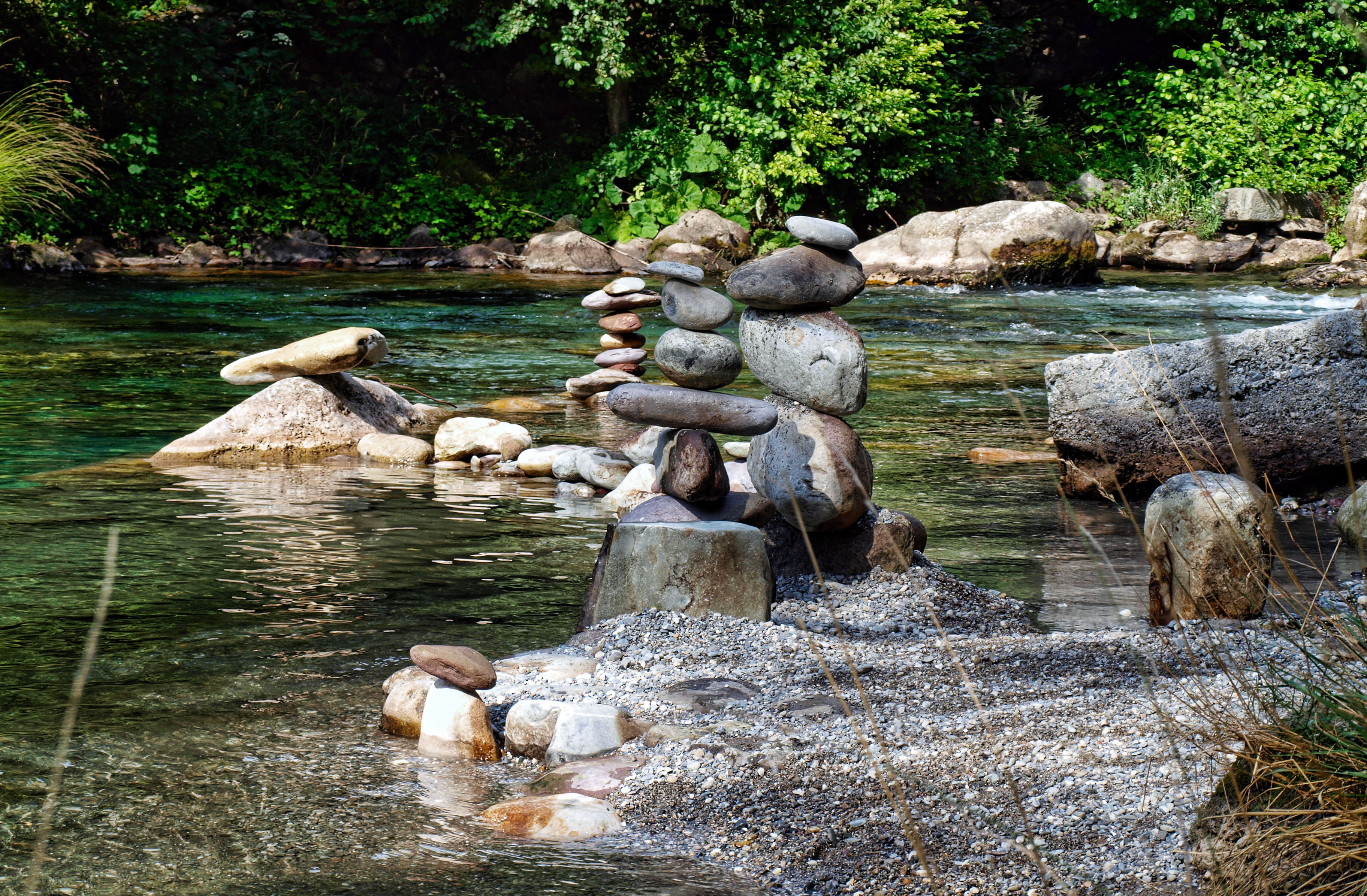 06540 Fontan, France